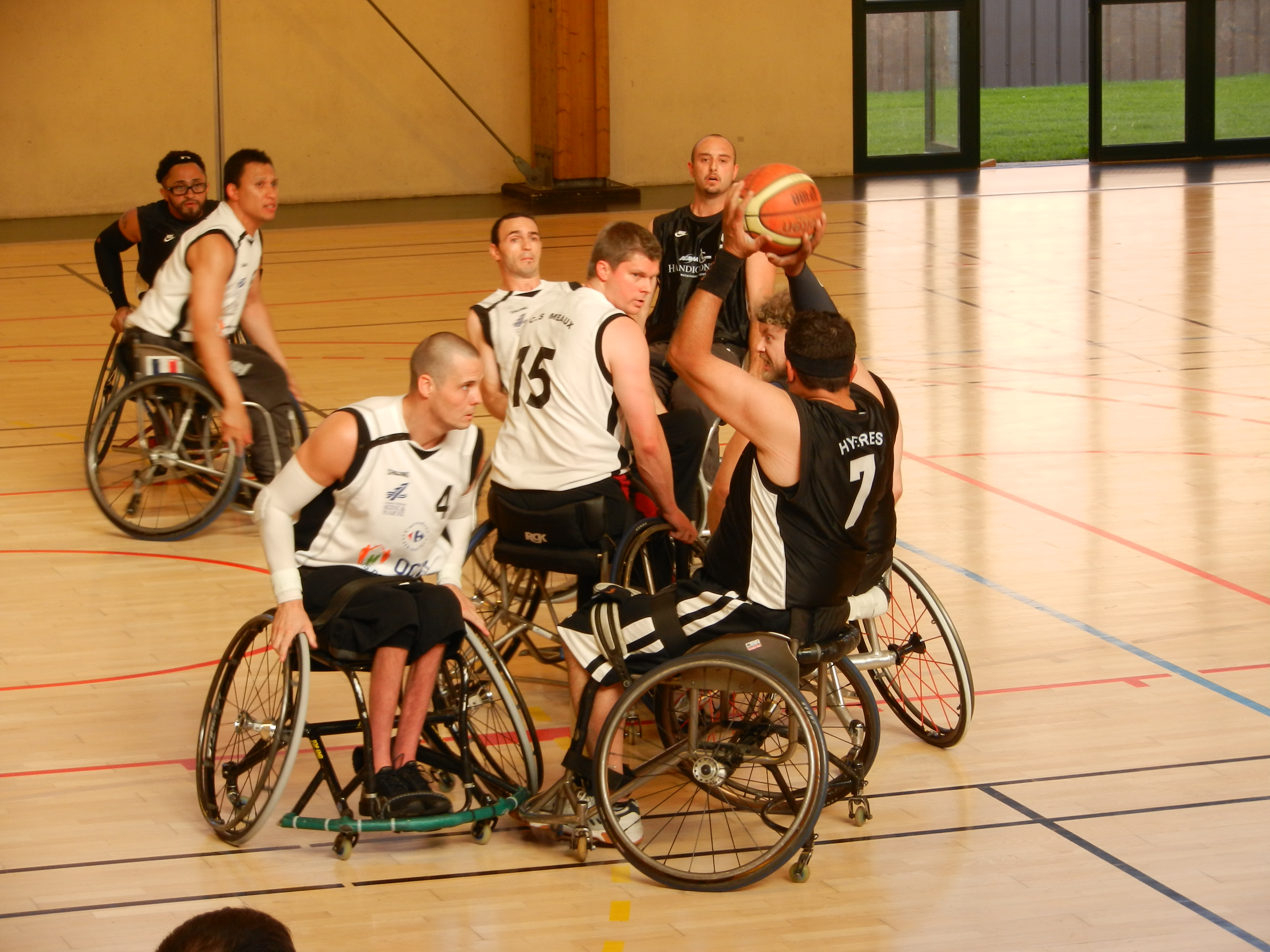 Finale retour du championnat de France handibasket 2011-2012, Meaux (blanc) face à Hyères (noir)